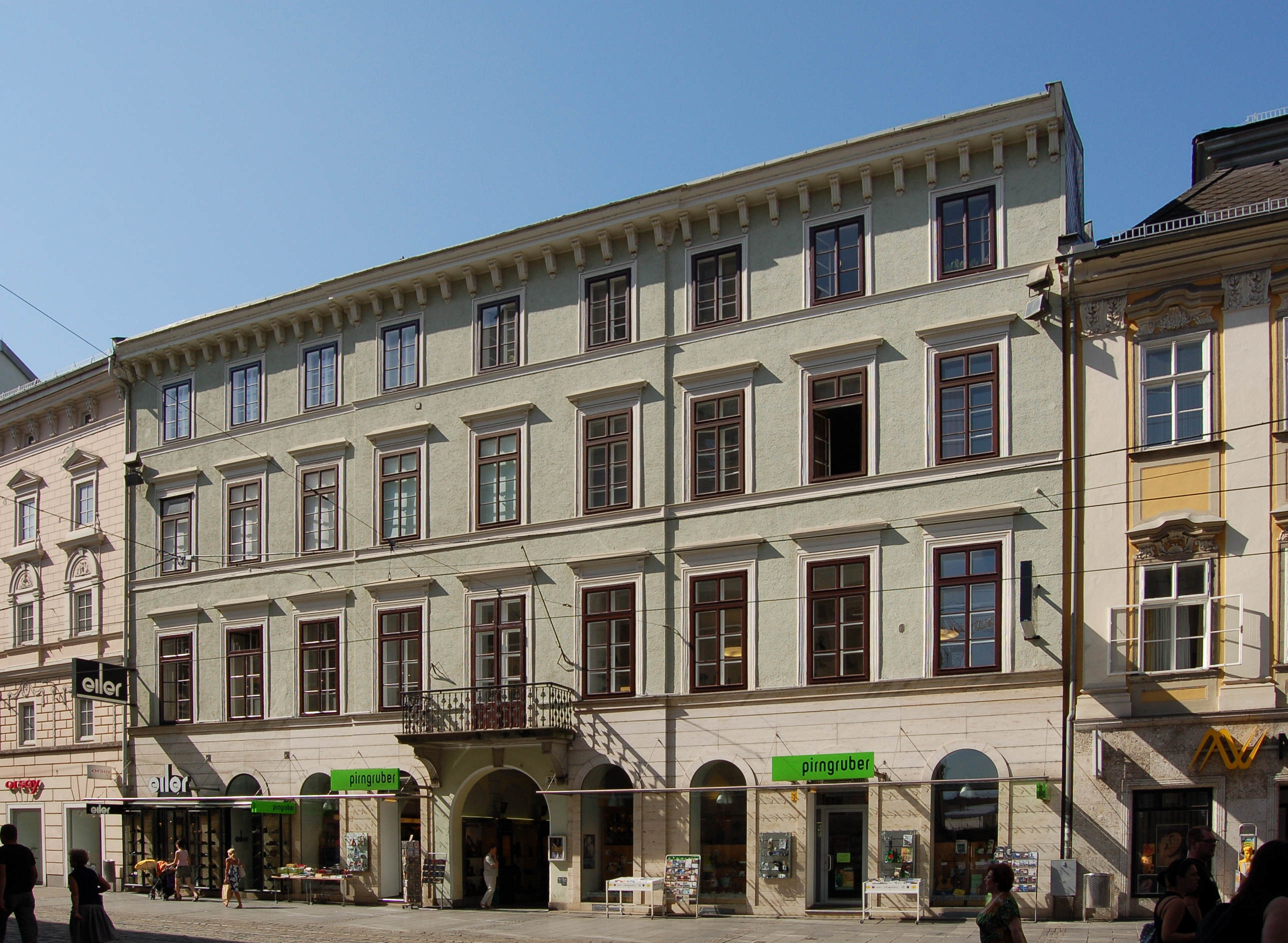 Das Gebäude Landstraße 34 in Linz (Oberösterreich).